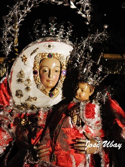 Nuestra Señora del Pino, Patrona de la Diócesis de Canarias.